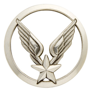 Insigne de béret des unités aéroportées